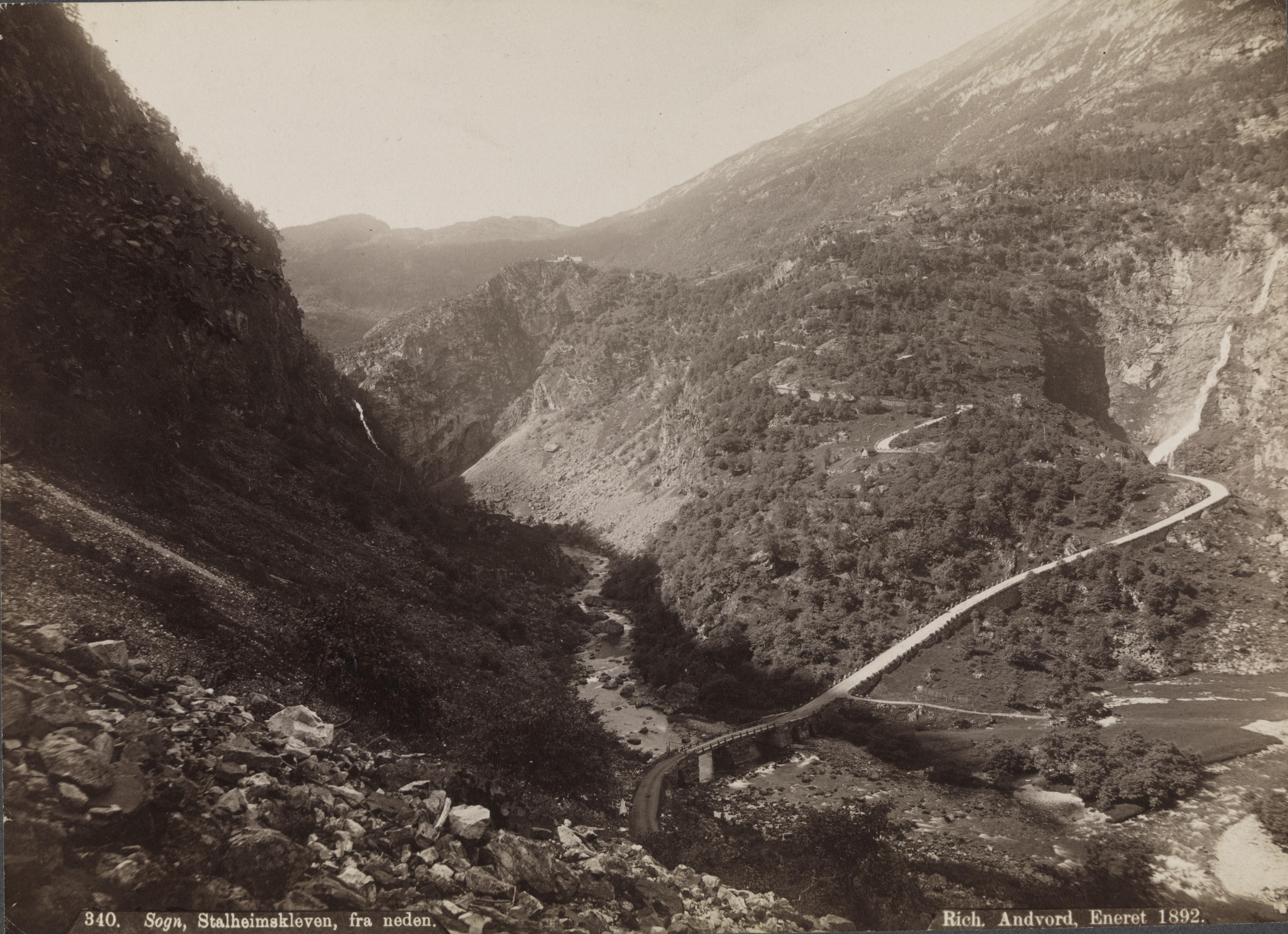 OBS Dette er ikke helt det samme bildet som tittelnummer 1521793 Sted: Stalheimskleiva Kommune: Voss Fylke: Hordaland Tagger: veier landskapsfotografi samferdselsfotografi